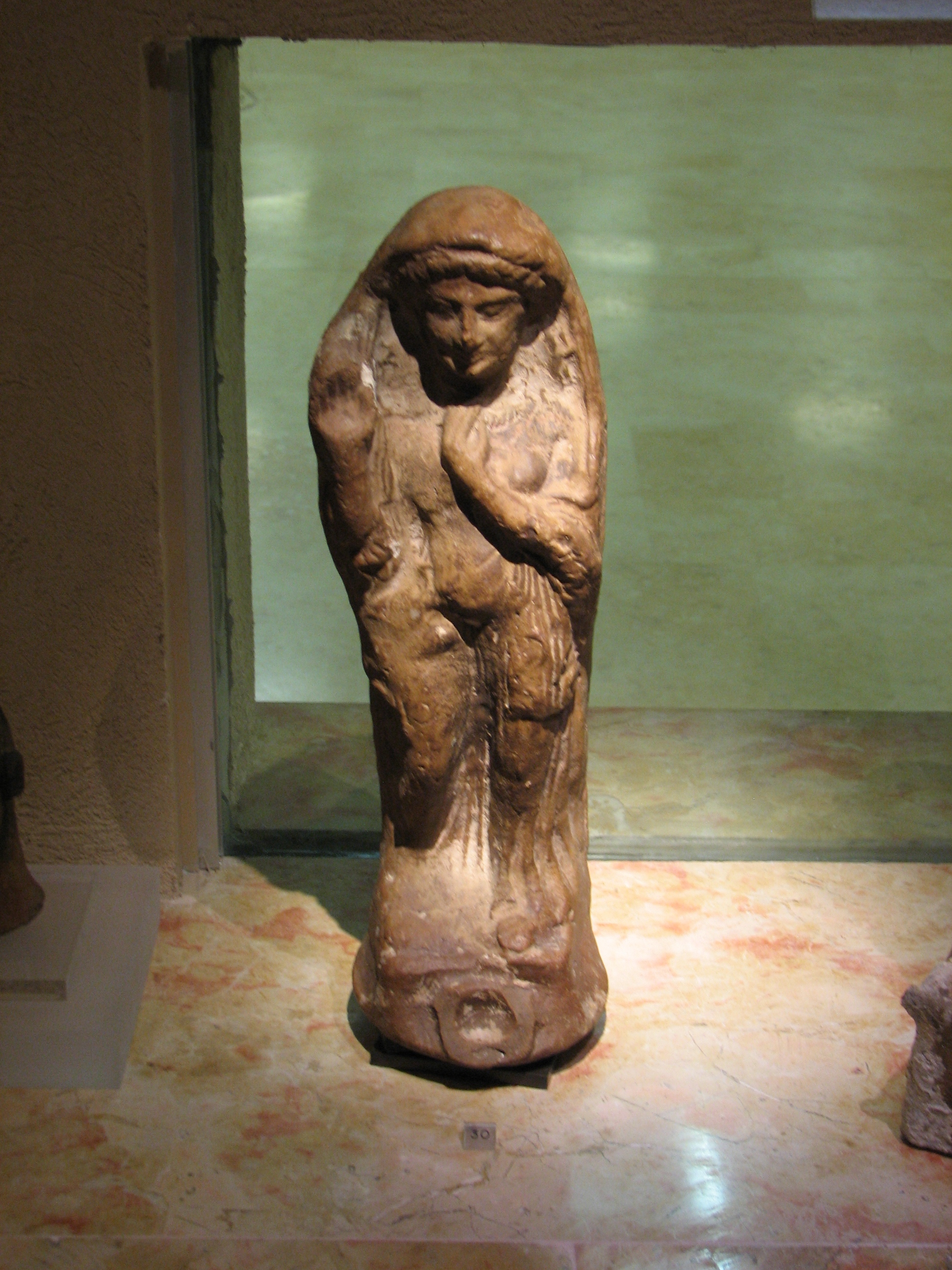 The Reuben and Edith Hecht Museum is a museum located on the grounds of the University of Haifa, Israel. Figurine from the exhibition in the museum depicts goddess Tanit. צלמיות מהעת העתיקה מתקופות שונות, חלק מהתצוגה של מוזיאון הכט שנמצא באוניברסיטת חיפה צלמית בדמות האלה "עשתורת-תנית", אלת הפיריון הפניקית. יד ימין מורמת בתנועת ברכה.